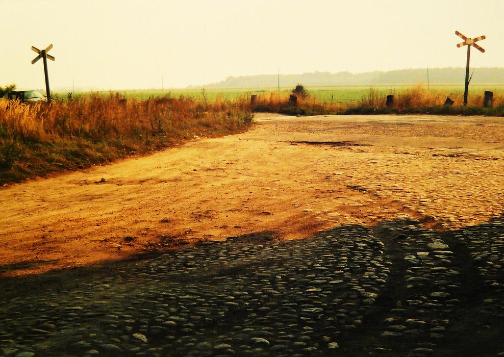 Pozostałości kolei folwarcznej w Strykowie Poznańskim.